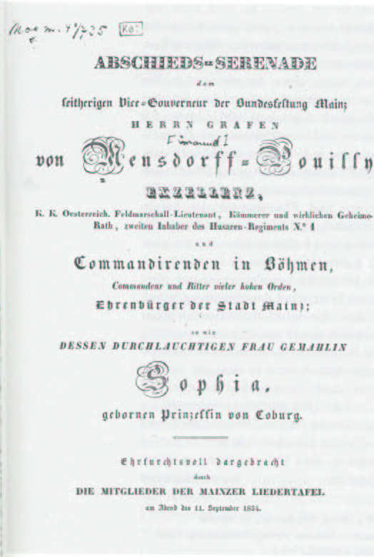 Mainzer Liedertafel Serenade für Graf Mensdorff-Pouilly